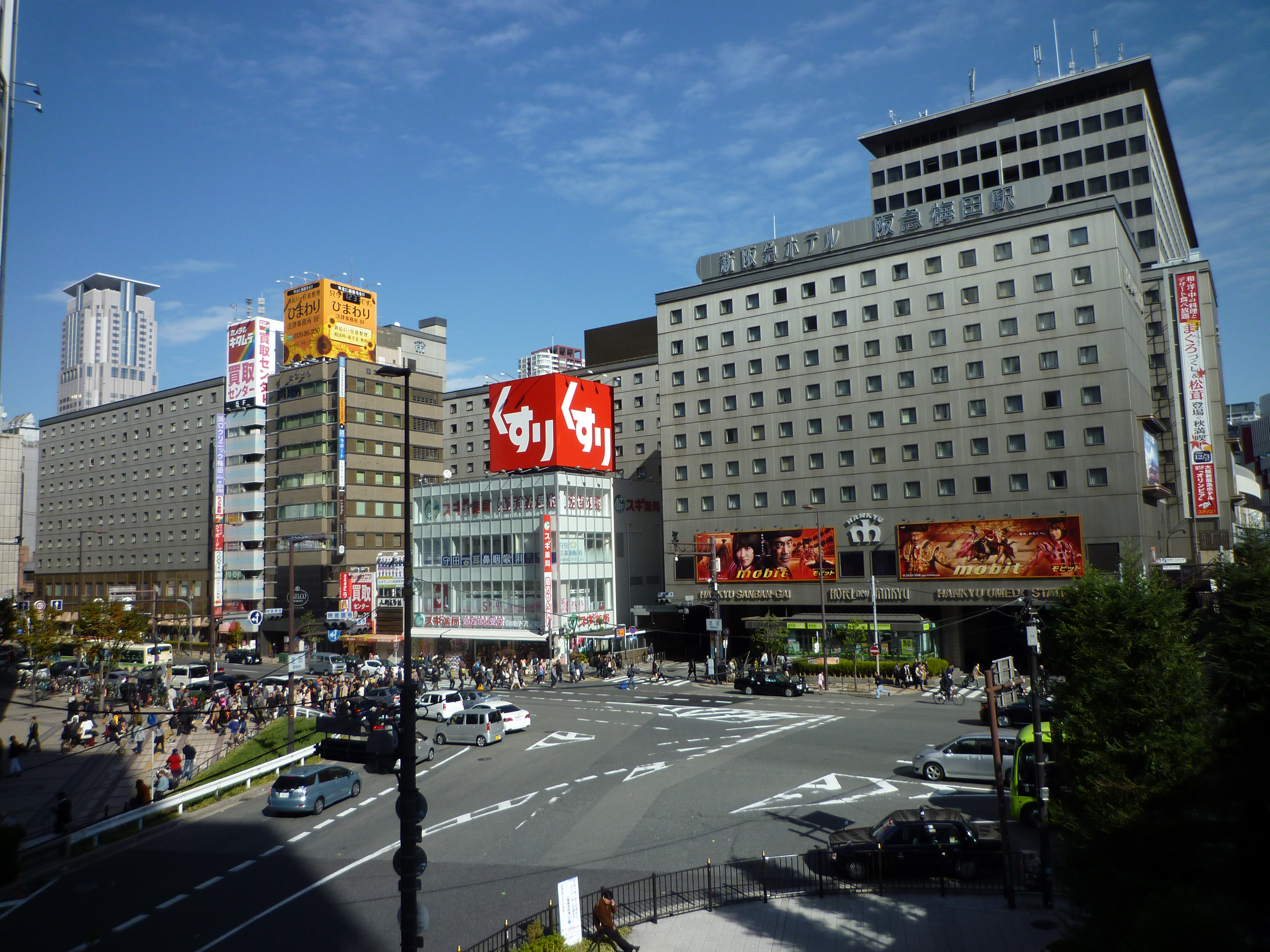 大阪新阪急ホテル